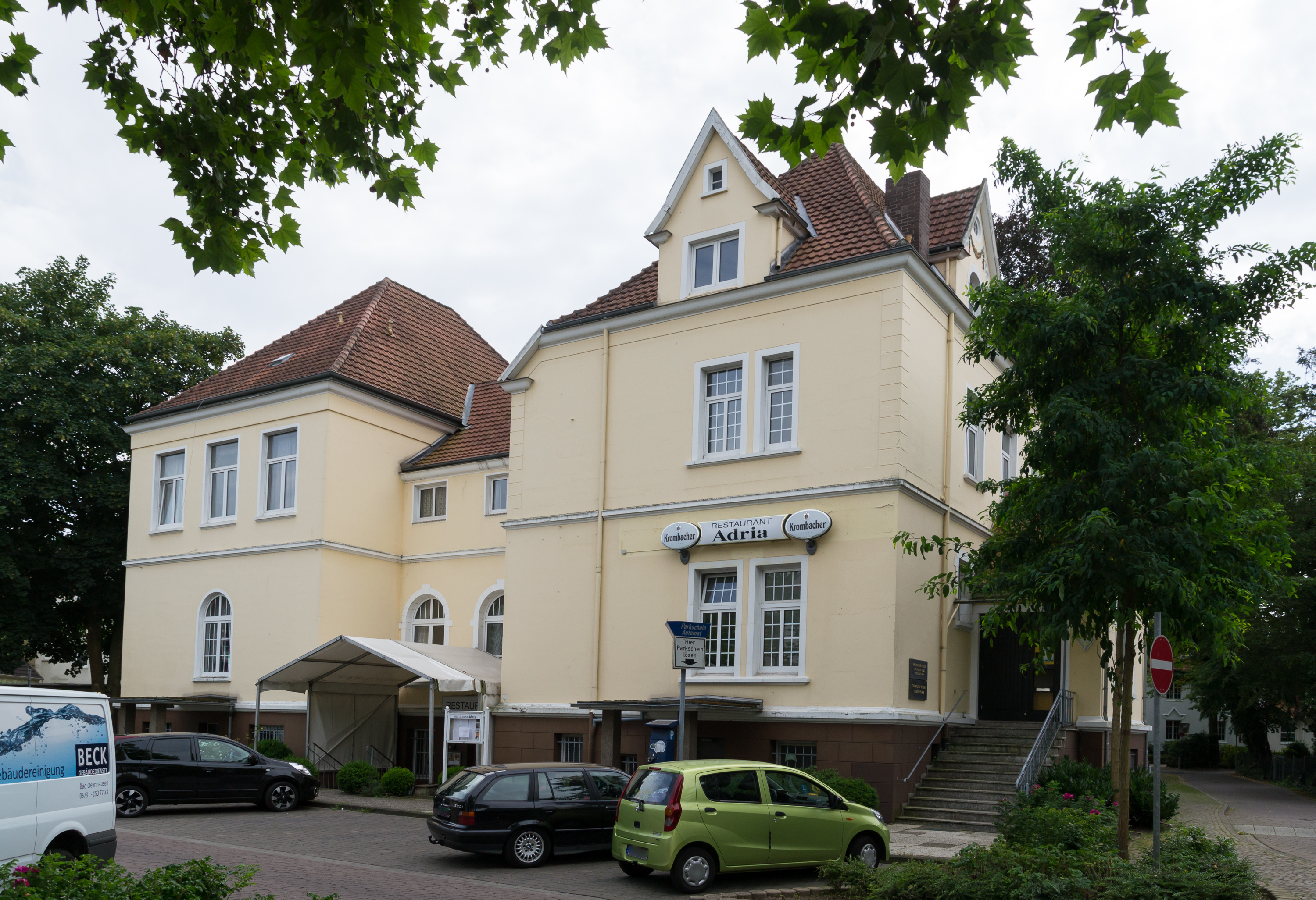 This image shows a heritage building in Germany, located in the North Rhine-Westphalian city Herford (no. 403). Logengebäude